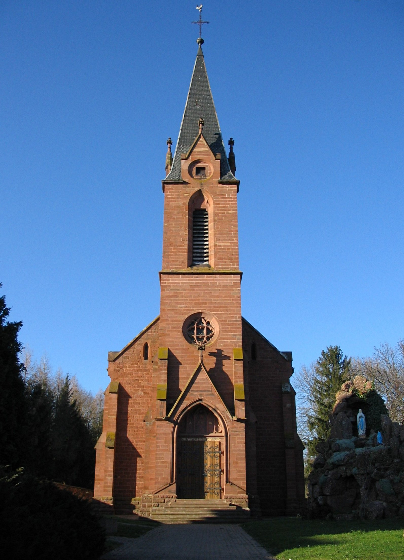 Vue générale de l'église catholique Saint Michel d'Allenwiller (Bas-Rhin)